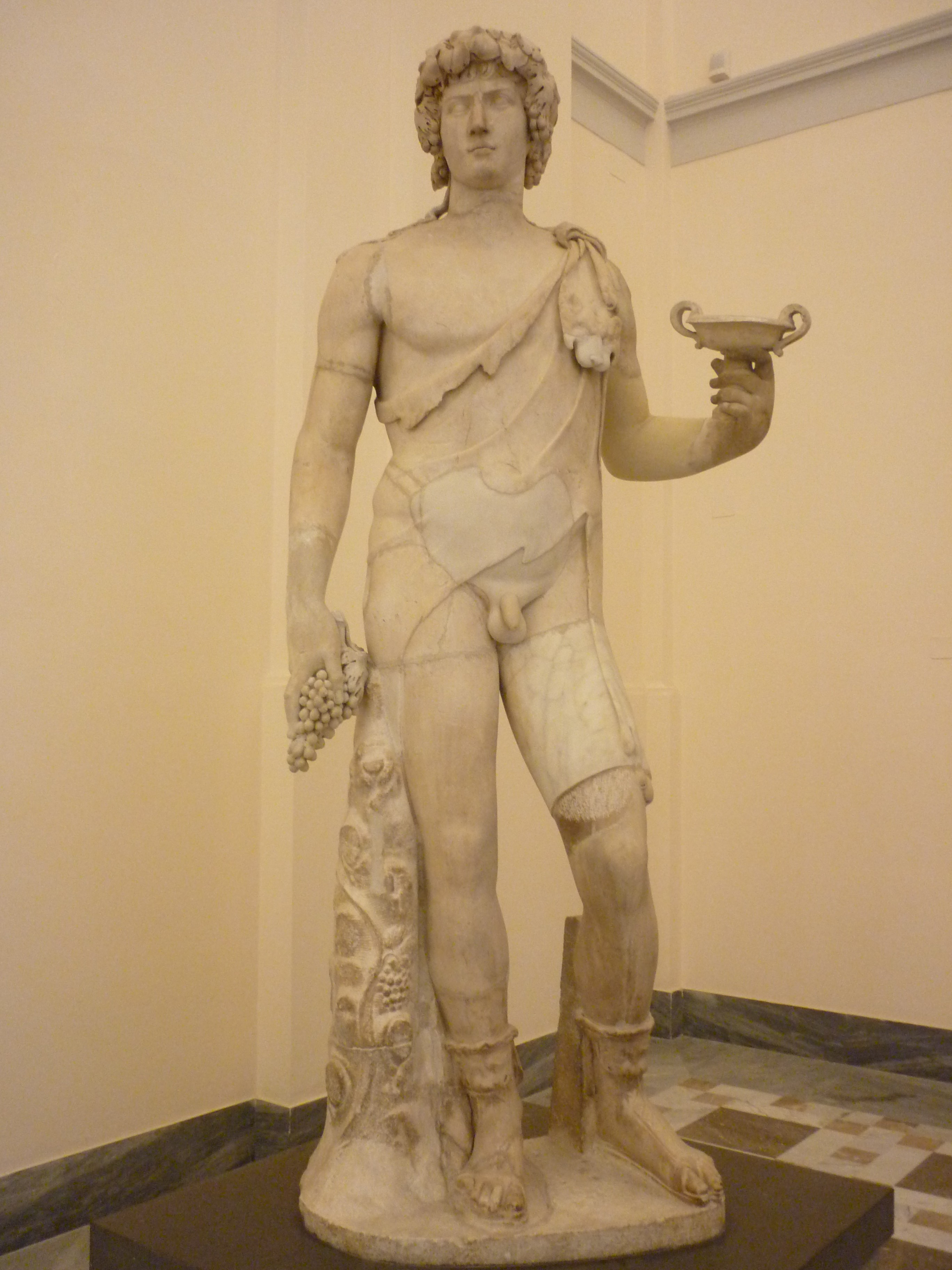 Statue de Antinous-Dionysos, Collection Farnese, Musée archéologique de Naples, inv. nr. 6314. Italie